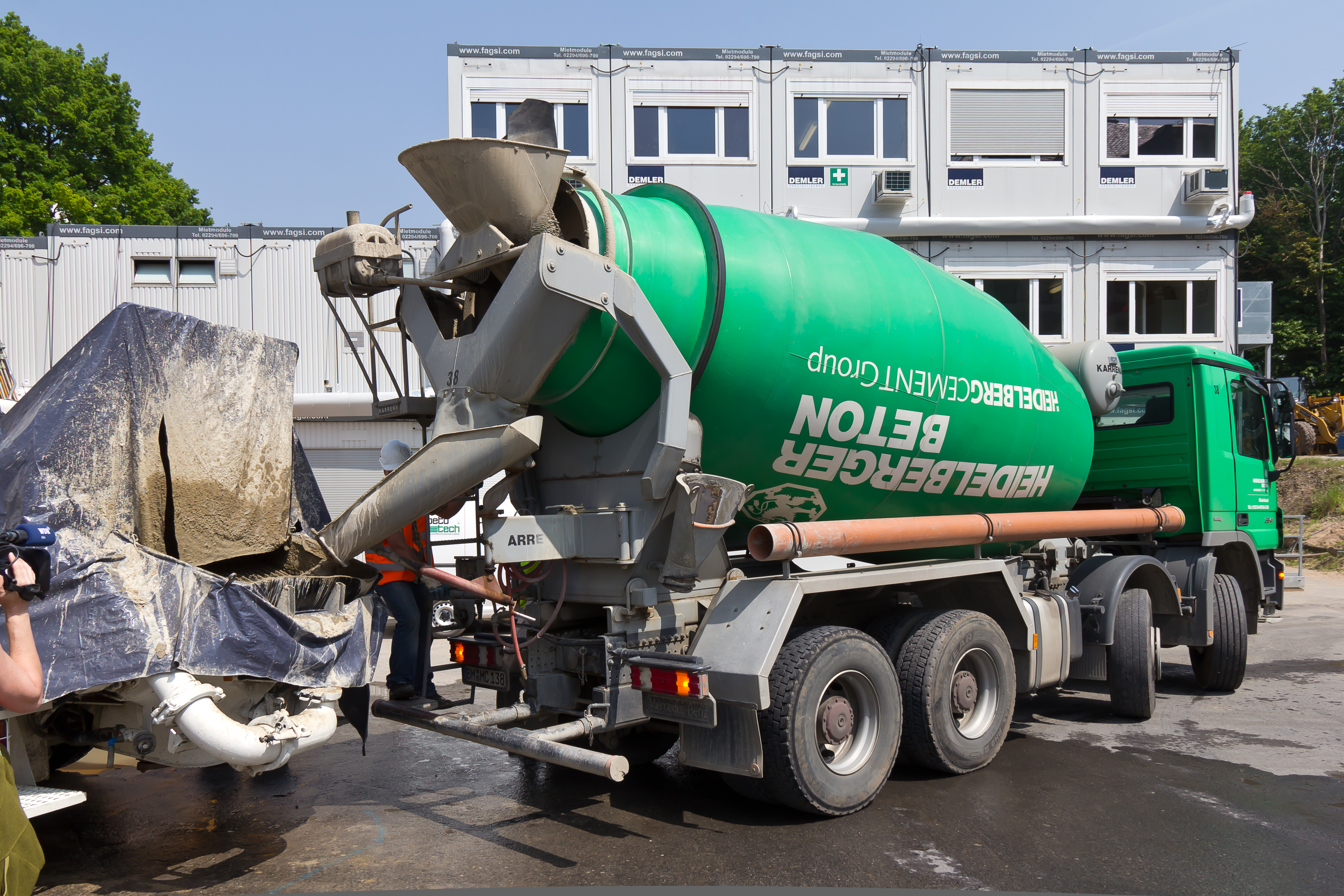 Historisches Archiv der Stadt Köln - Verfüllung der Bergungsbaugrube als vorbereitende Maßnahme zur Aushebung des Besichtungsbauwerkes Foto: Ein Betonmischfahrzeug der Firma HeidelbergCement füllt Beton in eine Betonpumpe